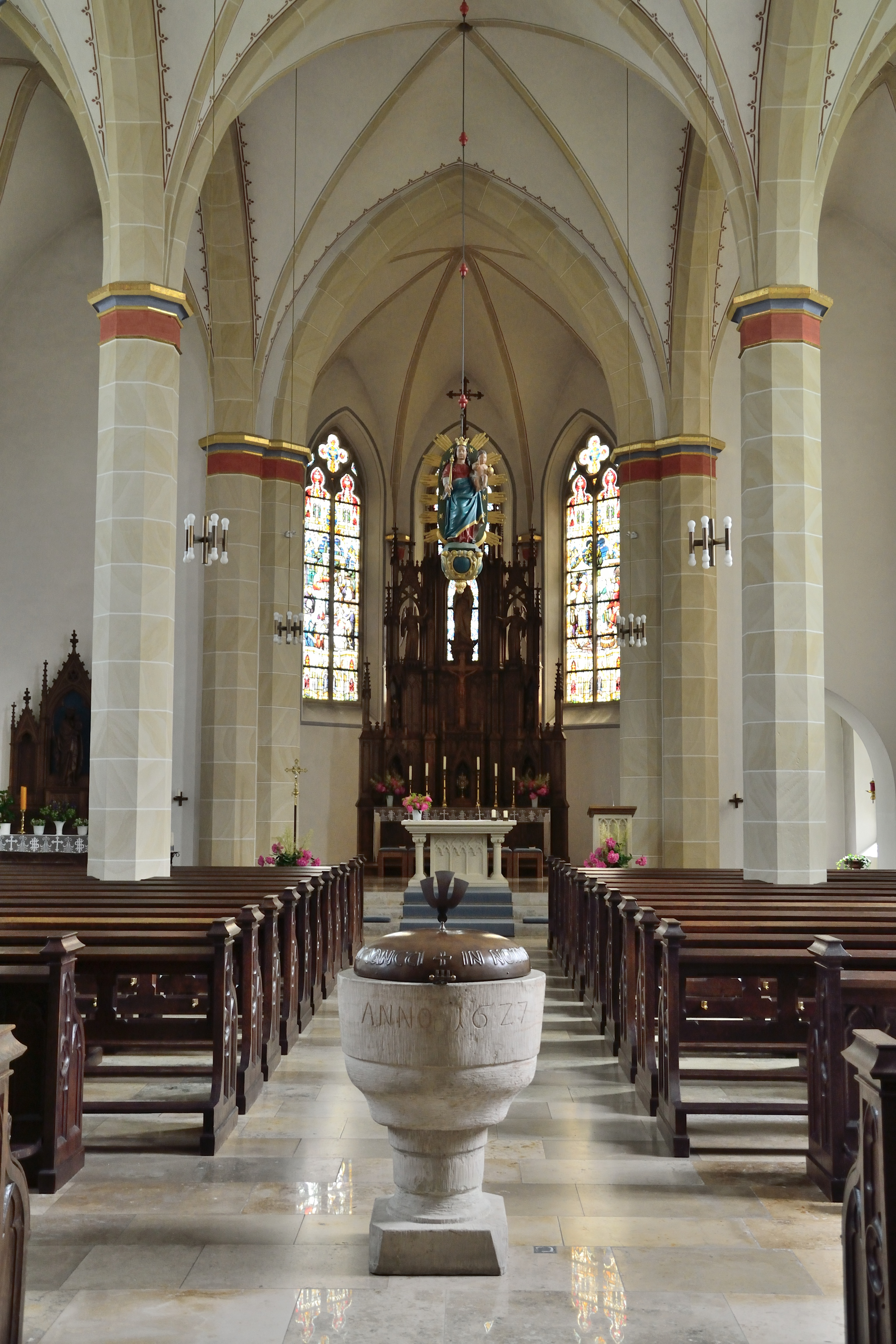 This is a photograph of an architectural monument. Katholische Pfarrkirche St. Dionysius in Steinheim-Sandebeck Innenraum